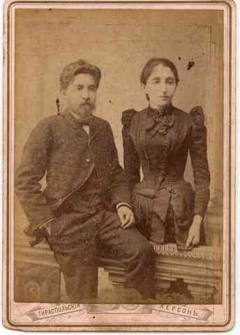 הזוג פניה ויעקב שרתוק בחרסון Yaakov & Fanya Shertok in Kherson פניה (האם)/ יעקב (האב) חרסון 02 משפחה עד 1914 2